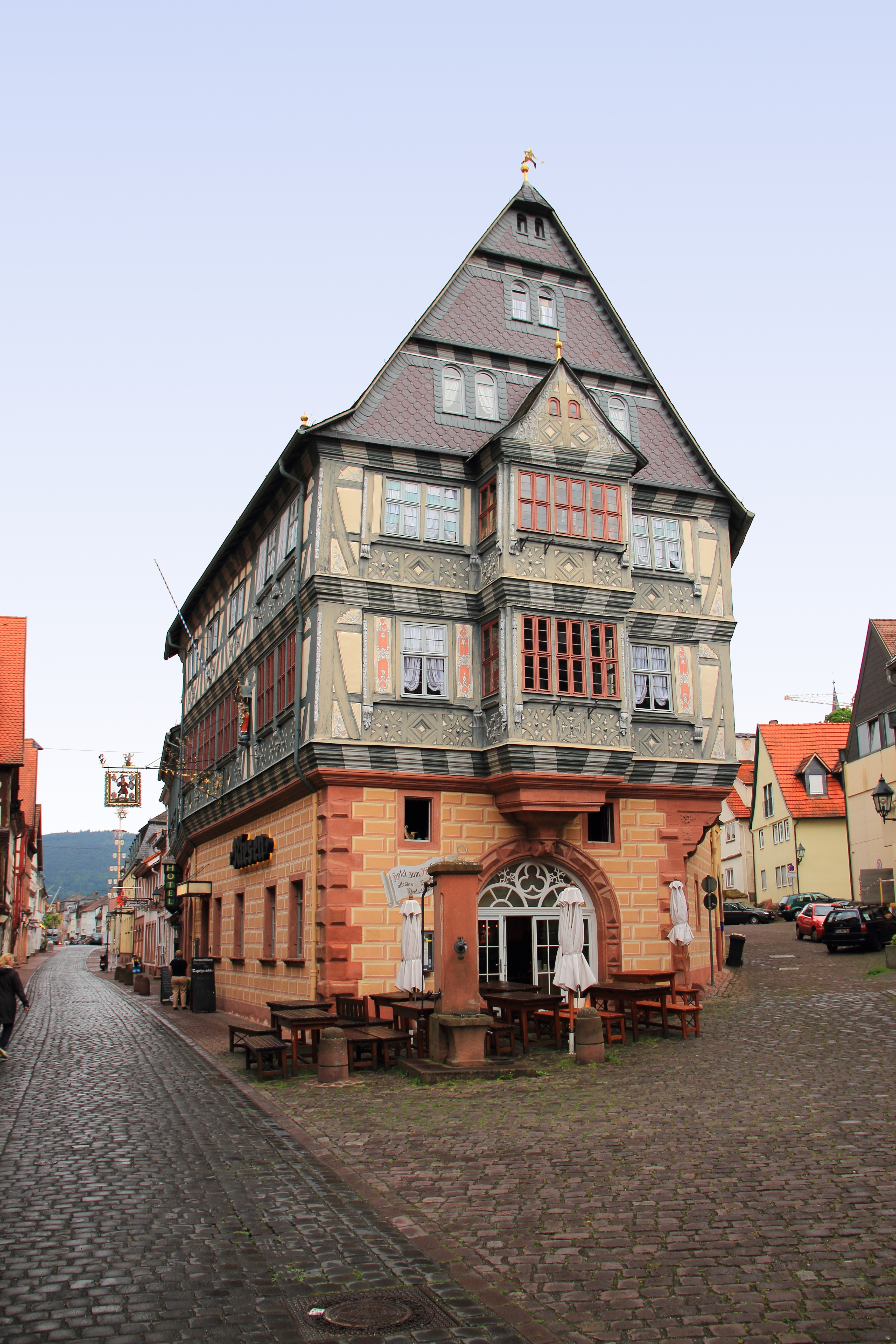 Das Hotel Riesen in Miltenberg im Abendlicht.